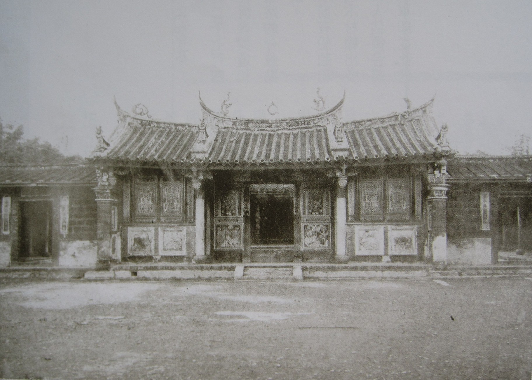 日治時期的六堆忠義祠